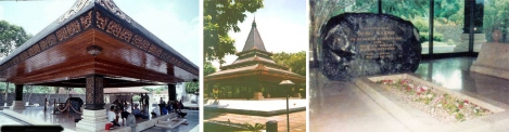 ini foto makam bung karno